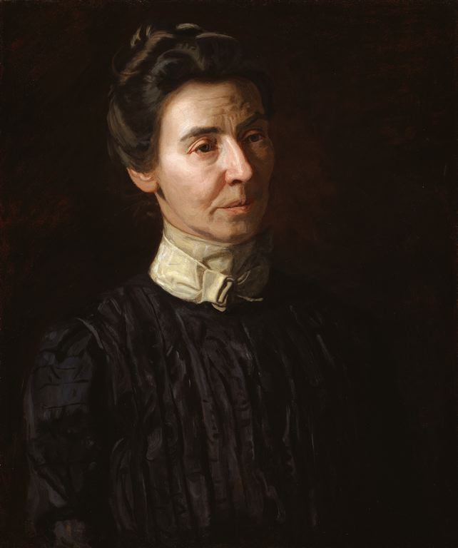 Addie, Woman in Black - G342